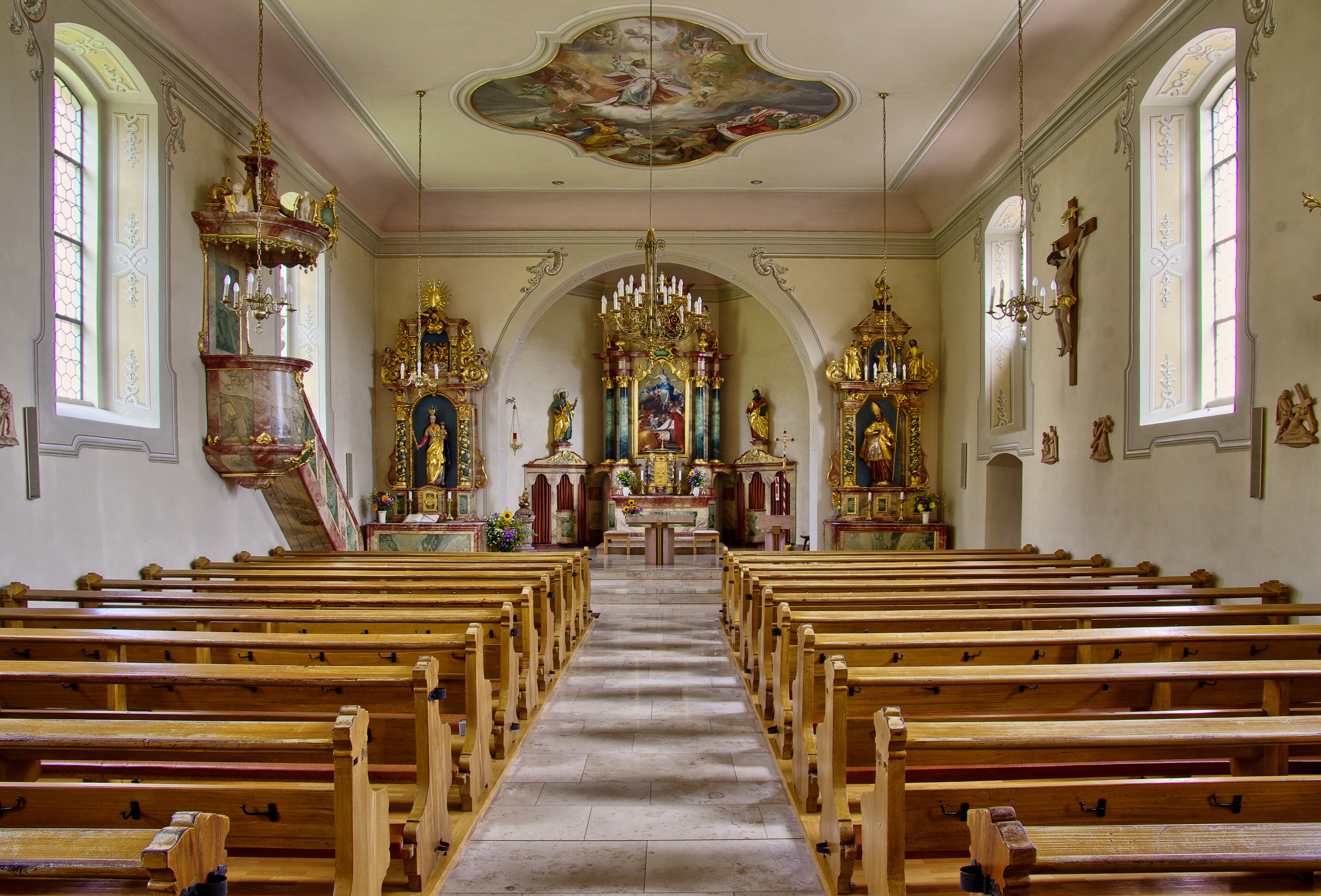 Die Pfarrkirche St.Nikolaus in Waldau Die Ortschaft Waldau gehört zu Titisee-Neustadt